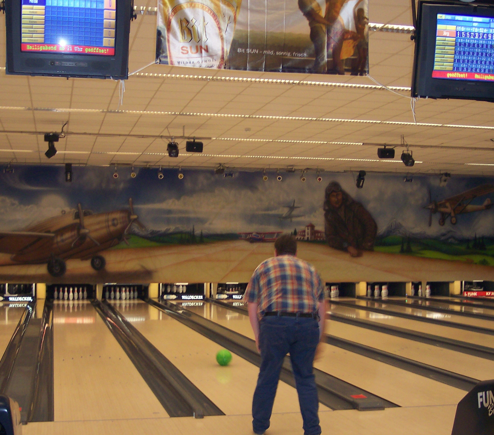 Aufnahme der Bowlingbahn in Höxter (NRW)